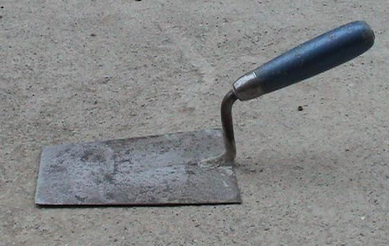 Kelle